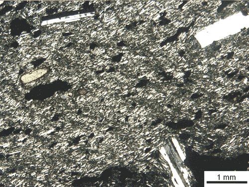 Basalto tholeitico. nicol incrociati